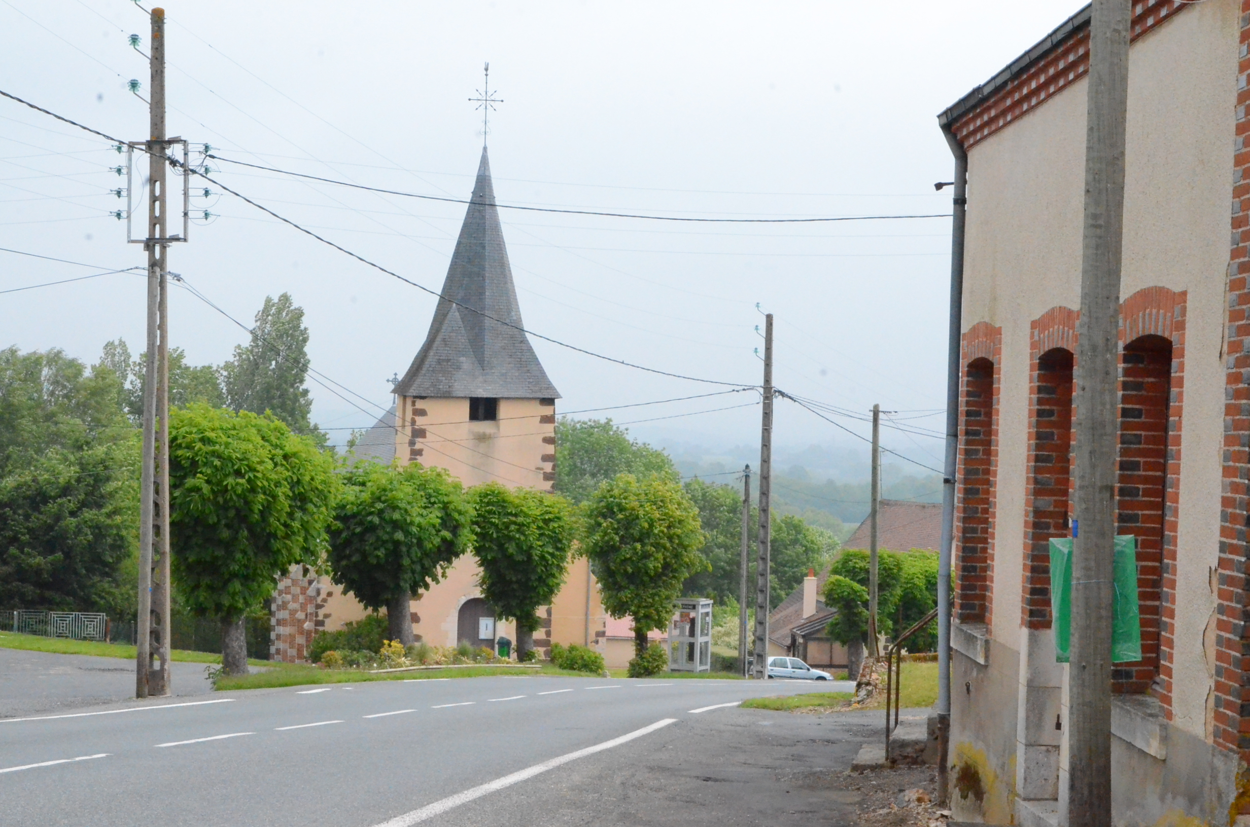 l'église est formée d'une nef rectangulaire avec un cœur terminé a l'est par un chevet à trois pan . la nef est éclairée de six fenêtres le cœur de cinq